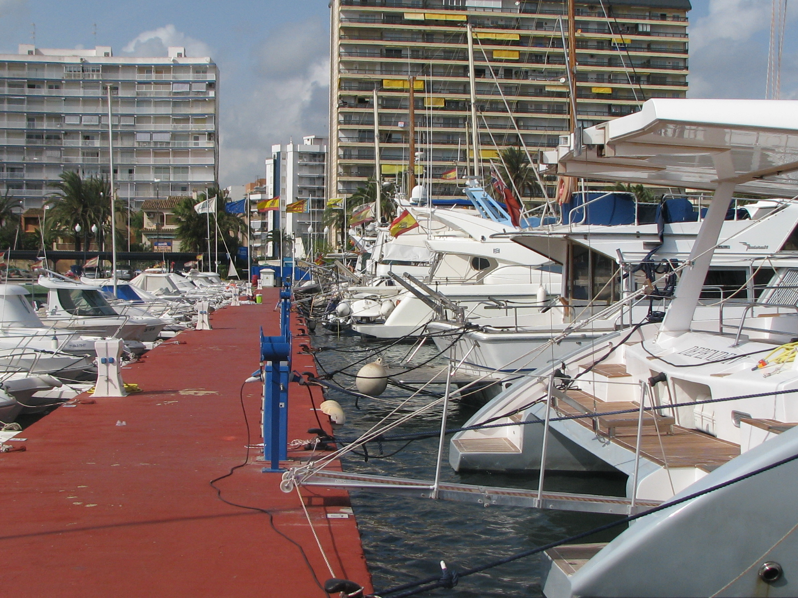 Marina de Puebla de Farnals (Valencia)